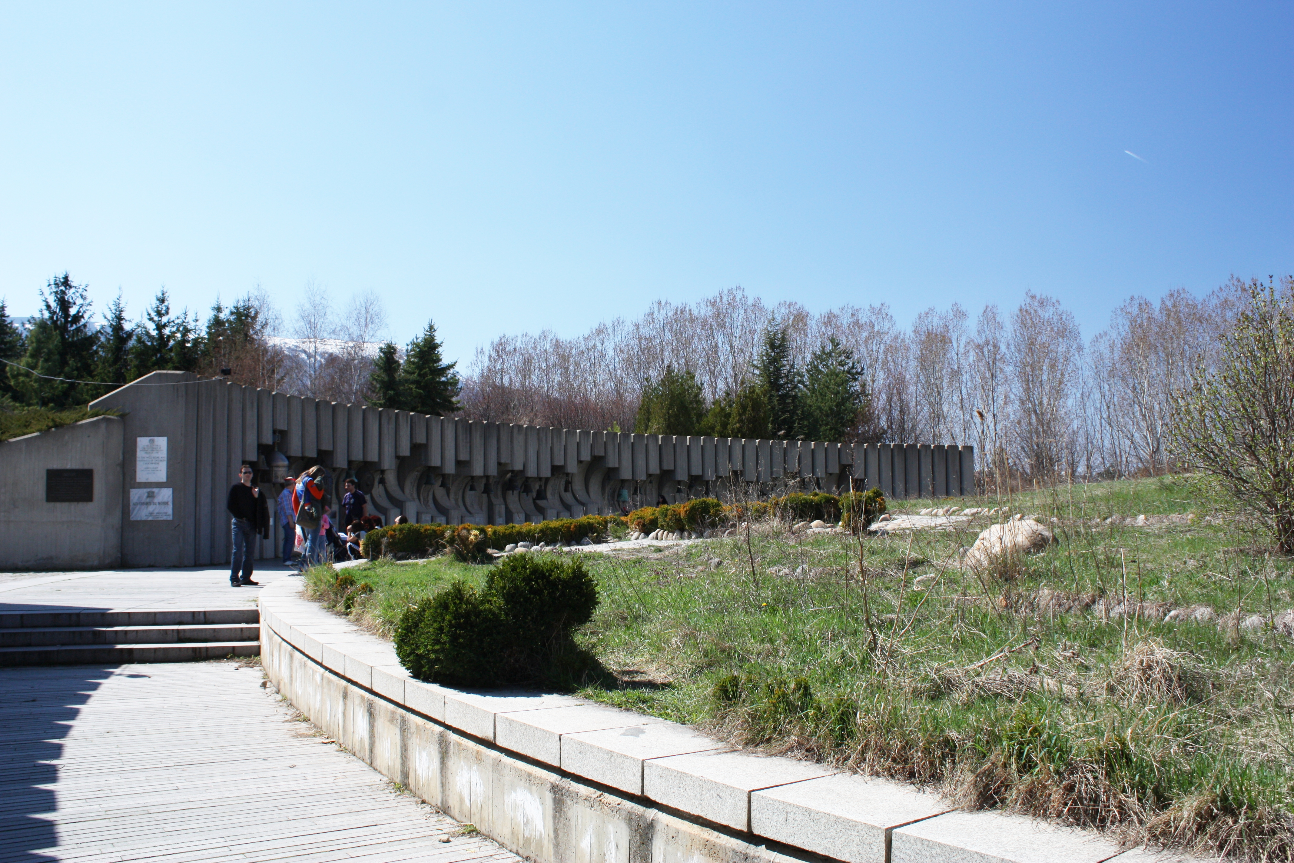 The bells, Die Glocken, Kambanite, Sofia, Bulgaria, Камбаните, София